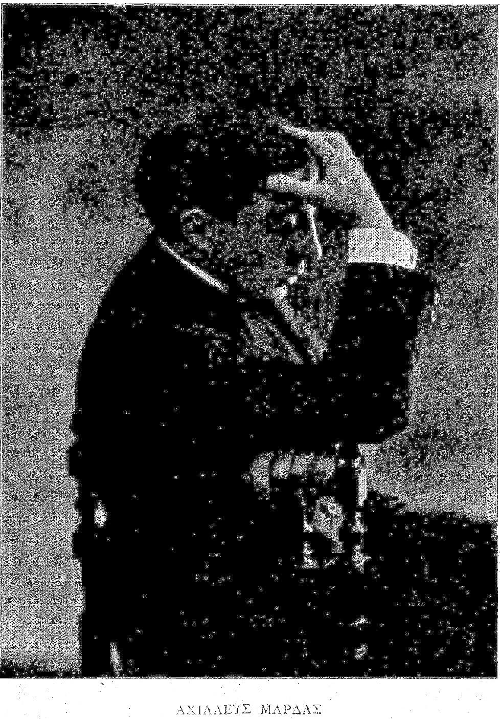 Griechischer Schauspieler, 19. Jahrhundert